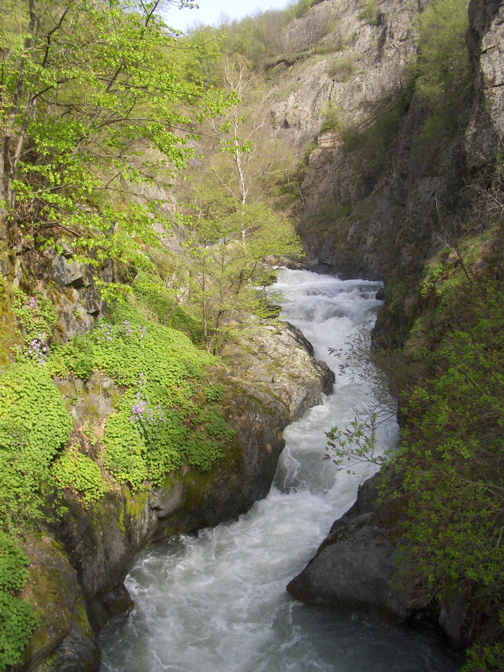 Снимка по екопътеката Бяла река